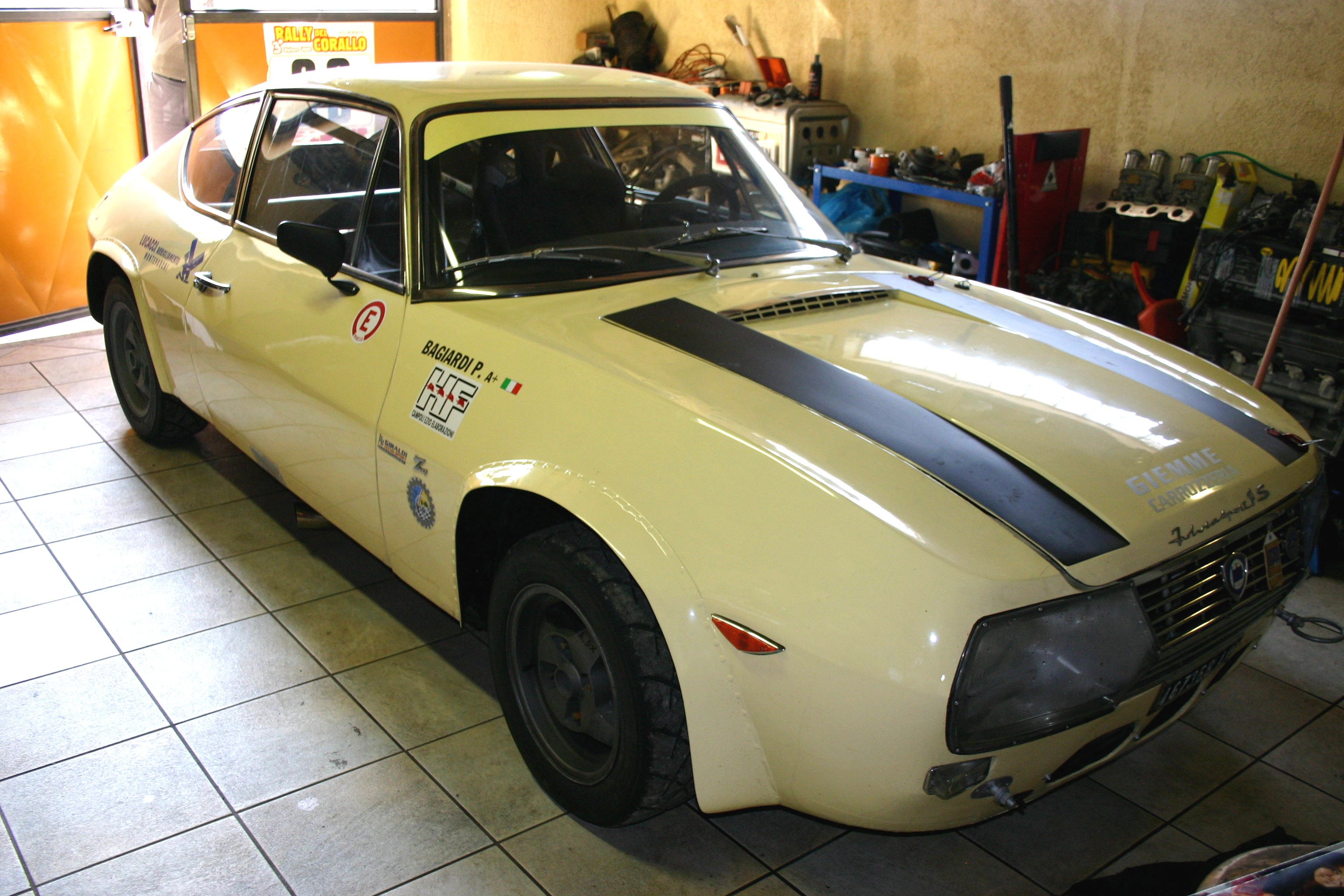 Lancia Fulvia Zagato preparata per le competizione di autostoriche